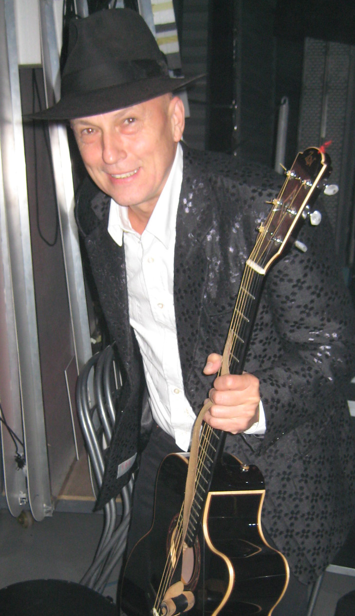 Vlado Kreslin, slovenian pop singer